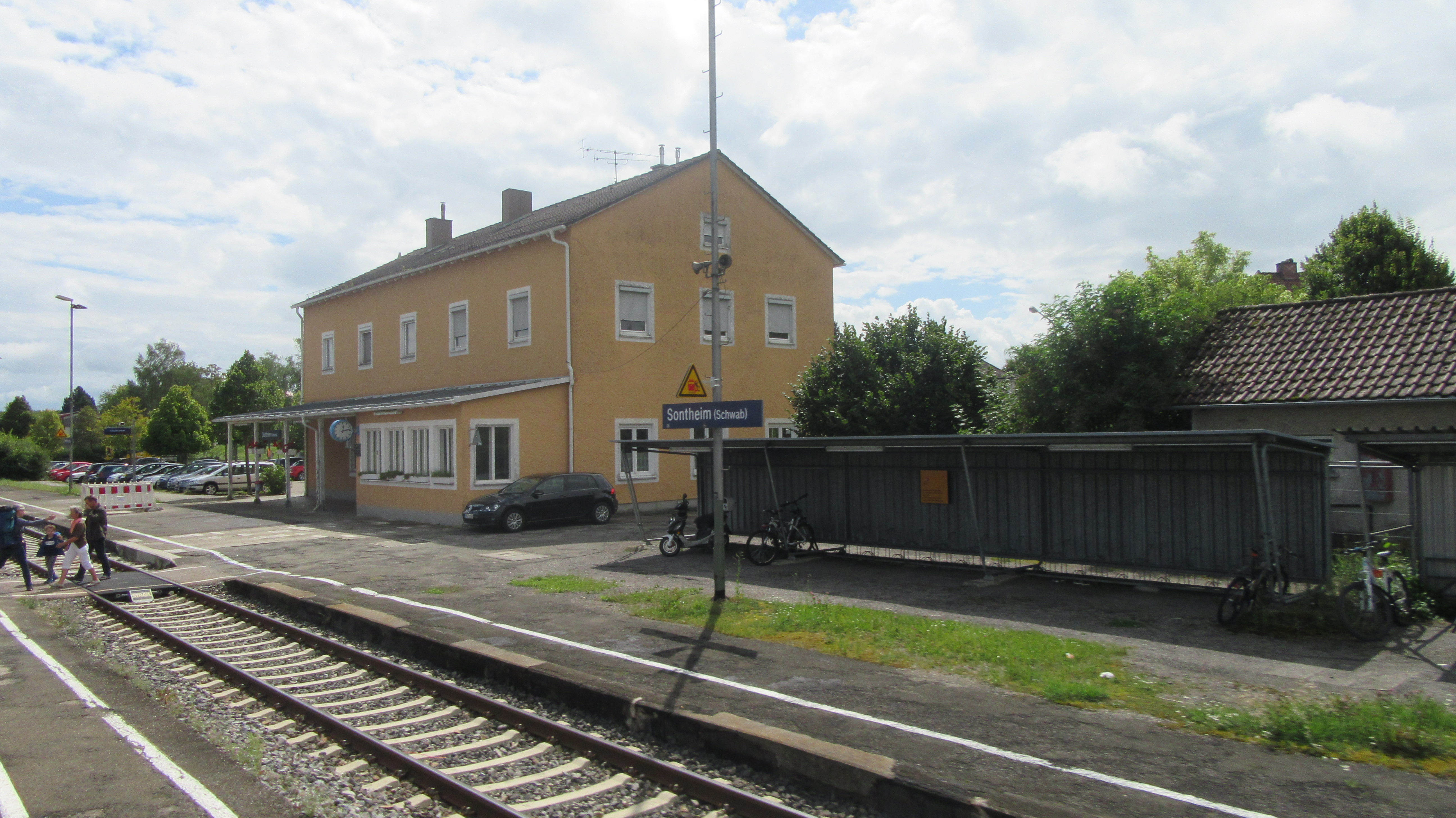 Bahnhof Sontheim (Schwab), Memminger Seite